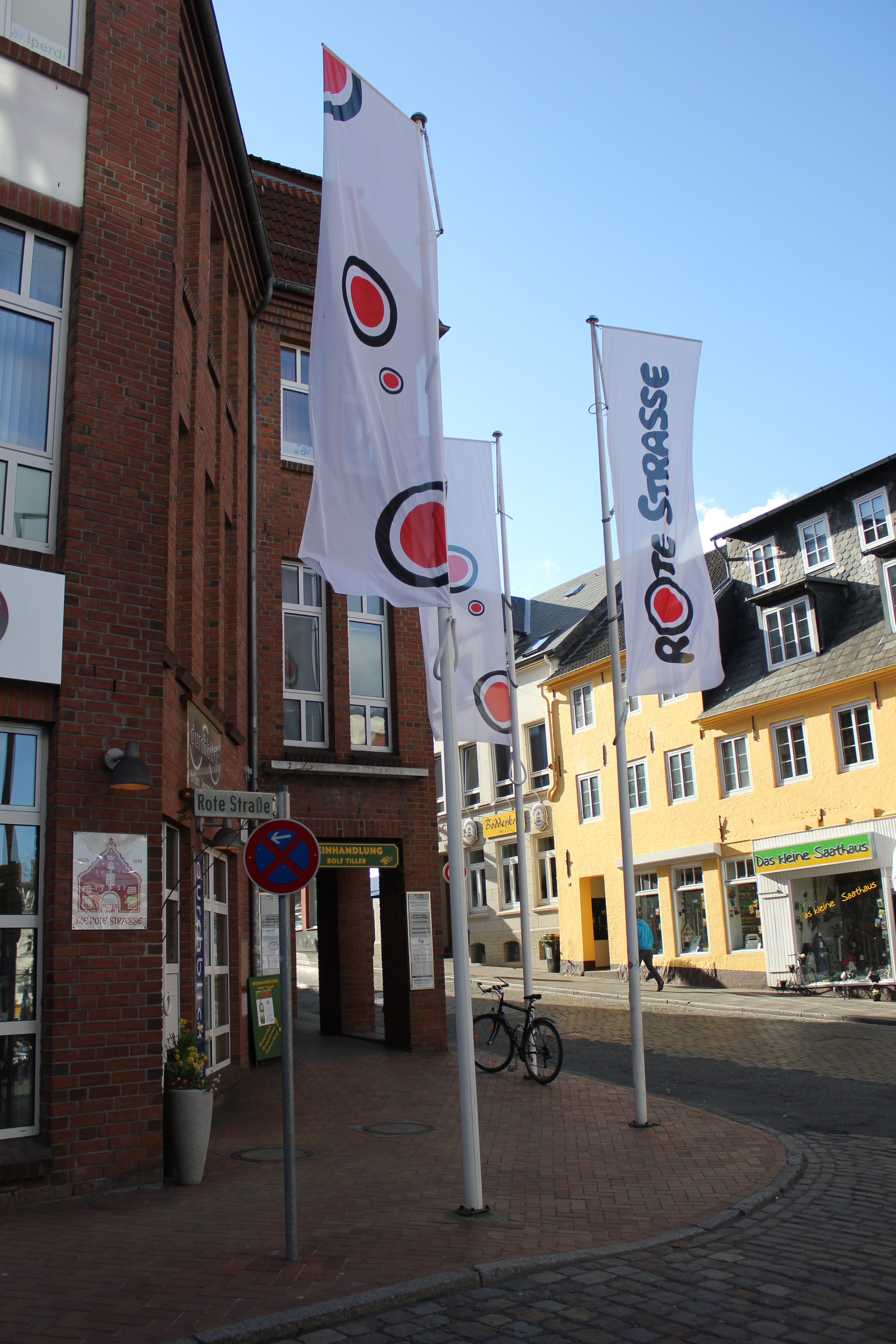 Beflaggung am Anfang der Roten Straße, Flensburg, Bild 1